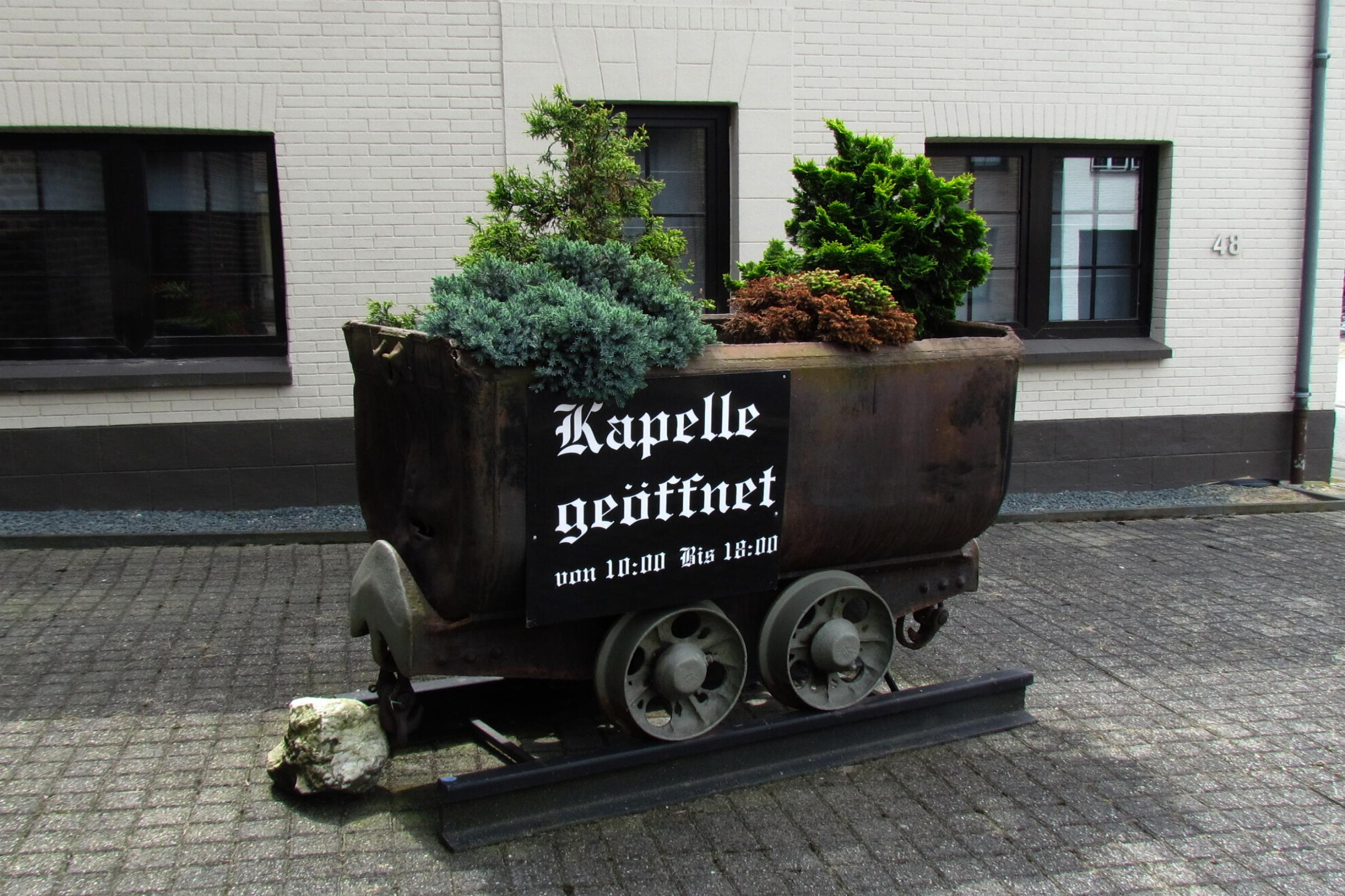 Schalbruch Lore an der Kapelle